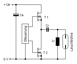 Resonanztrafo mit Leuchtröhre